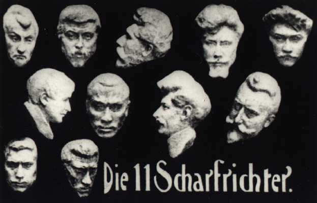 existierten 1901-1904